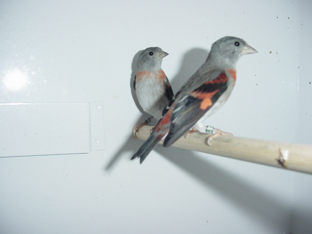 Dos hembras adultas. Description: Two black headed red siskin females(Carduelis cucullata) Creator: Luis Carocci. Date: 30 de noviembre de 2007 (30-11-2007) Place: Canada